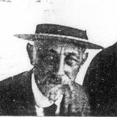 Camille Renault (Jean-Baptiste-Charles-Camille Renault)